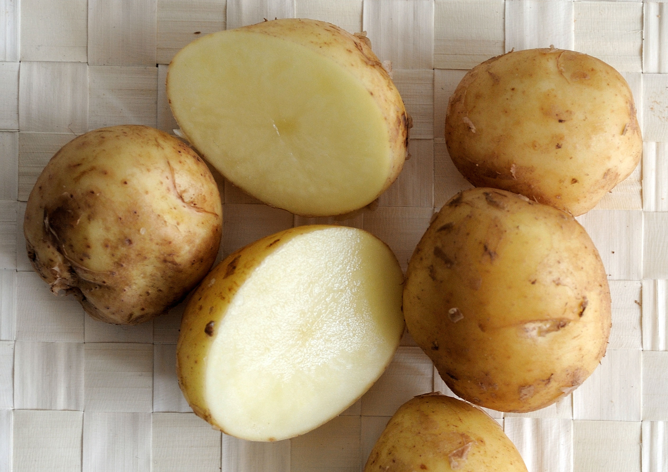 Pomme des terre primeur de l'île de Noirmoutier : variété Bonnotte.